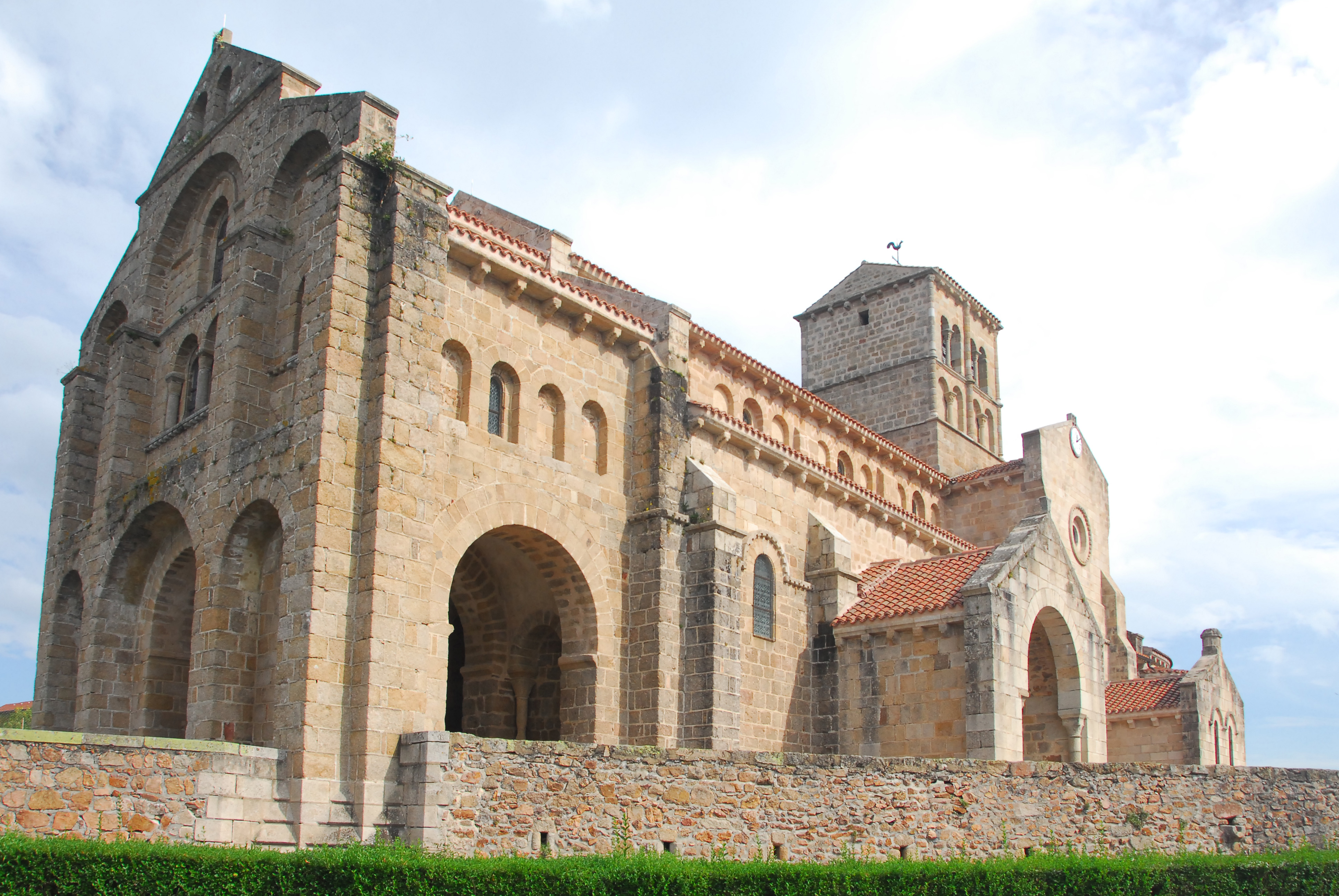 N.-D. de Châtel-Montagne, Portalvorbau, Ansicht von SW